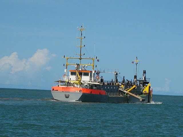 DREDGING IN DEGRAD DES CANNES CHENAL